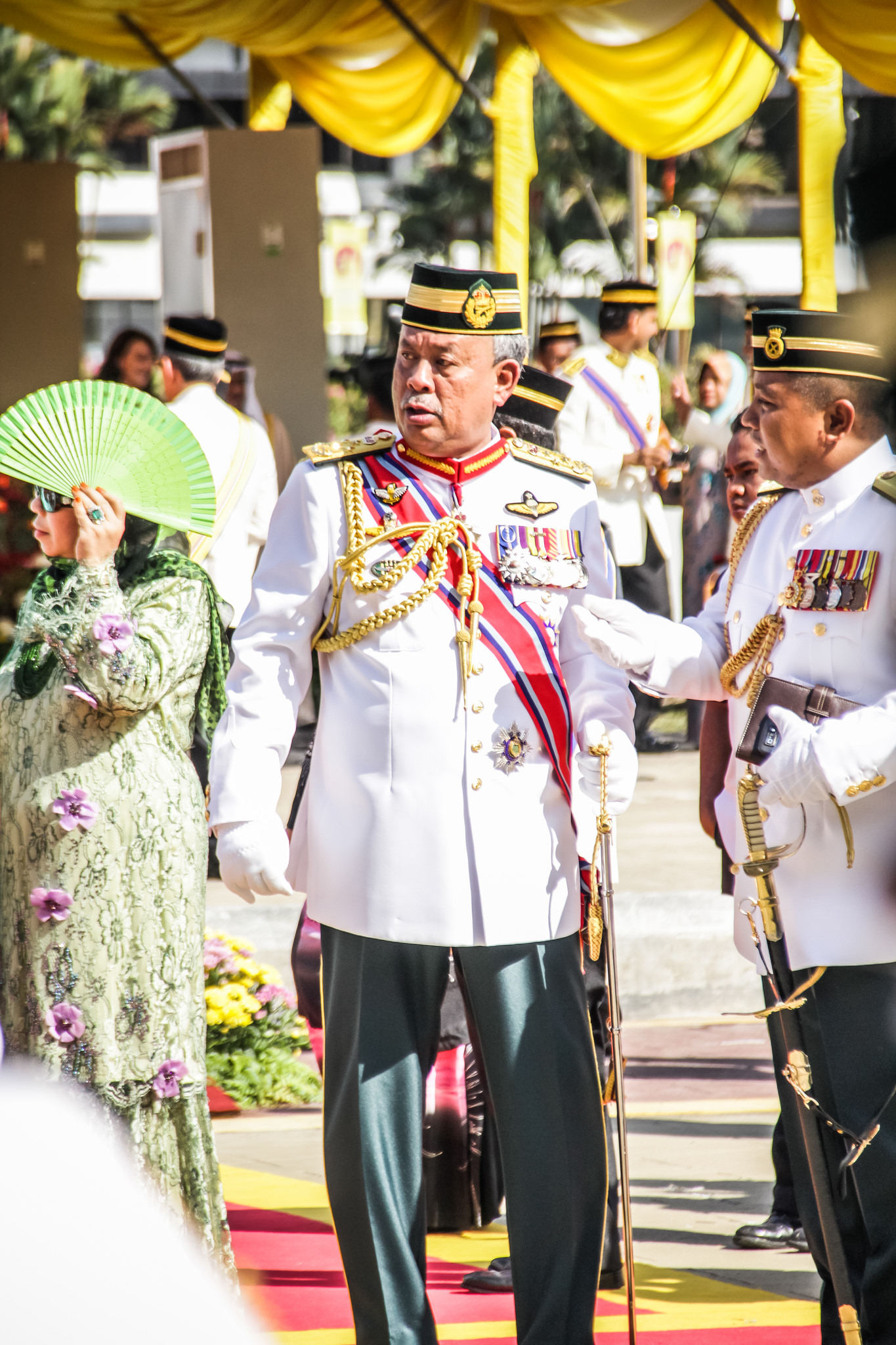 Jen Tan Sri Zulkifeli Mohd Zin ketika Istiadat Perarakan Panji-Panji SPB YDPA 2013